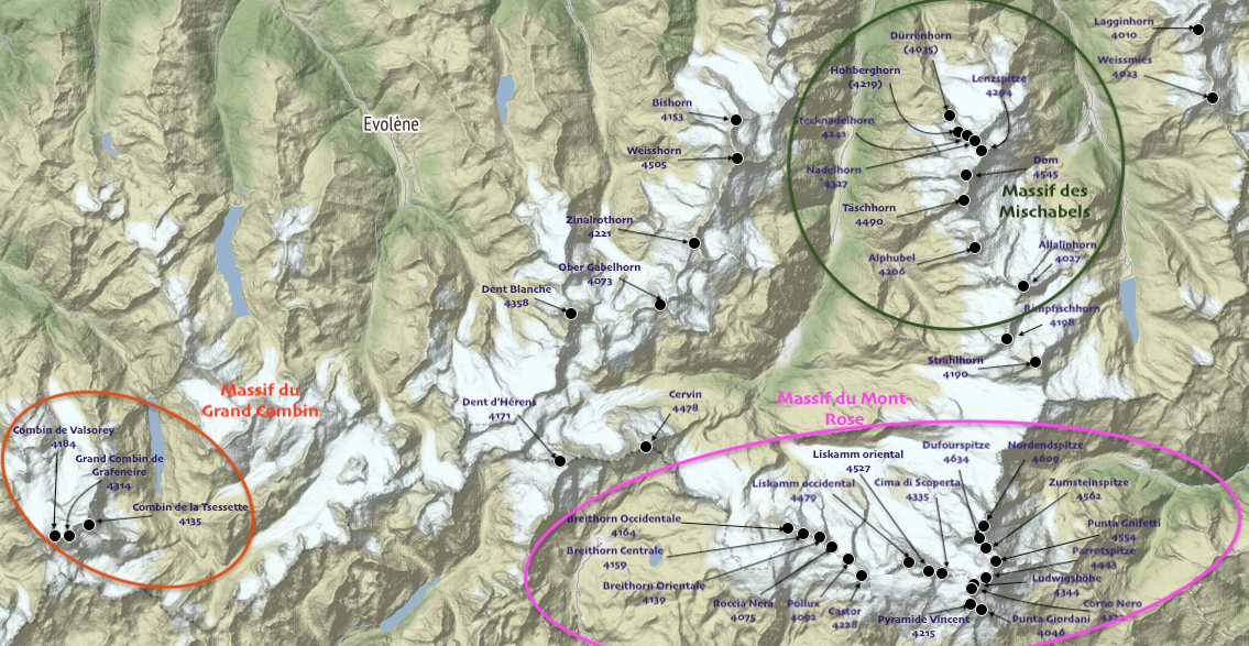 carte réalisée sur umap This map may be incomplete, and may contain errors. Don't rely solely on it for navigation.